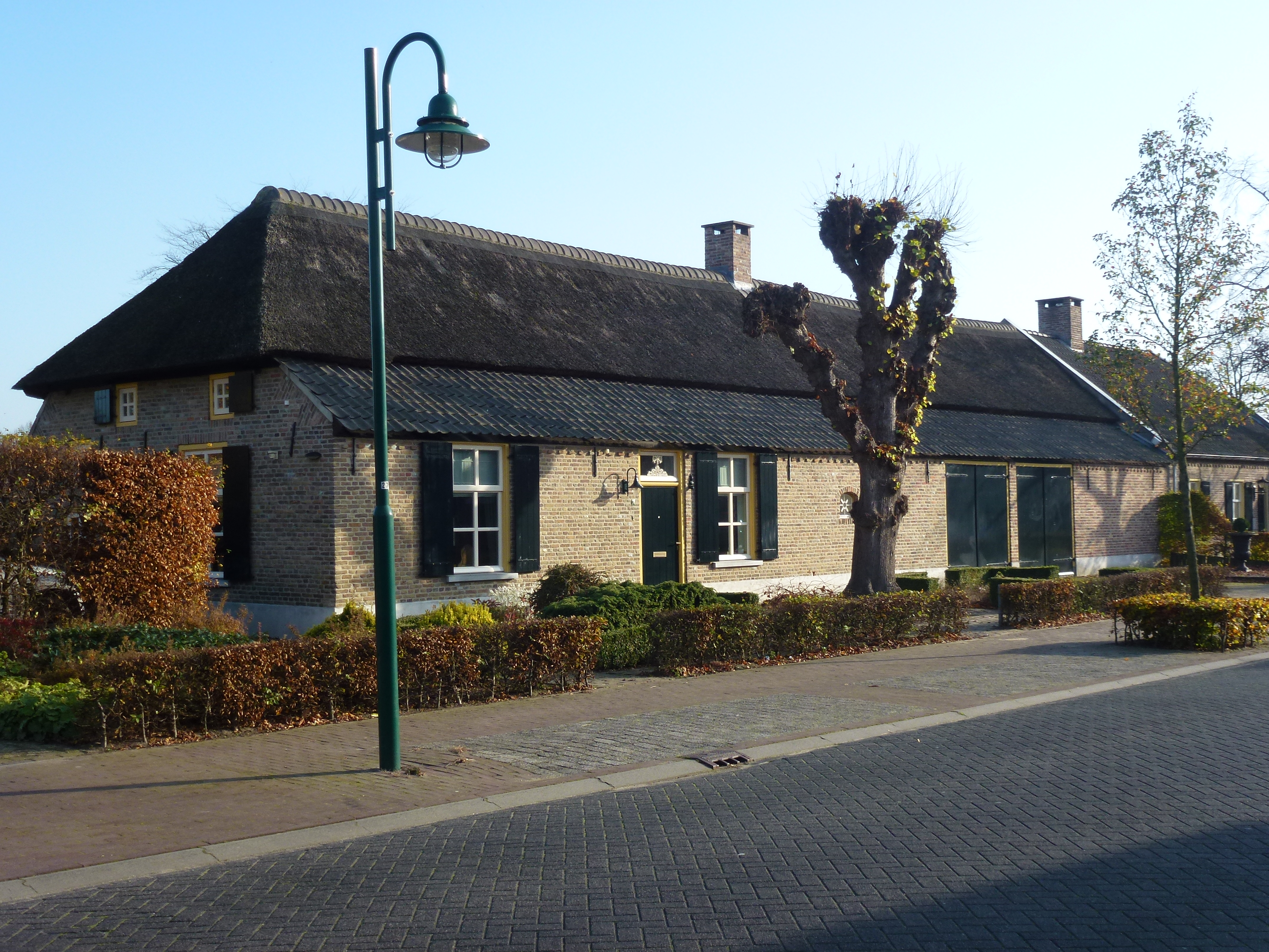 Dorpsstraat 76 Lieshout Monument 25885